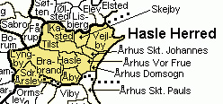 Århus Amt, Denmark